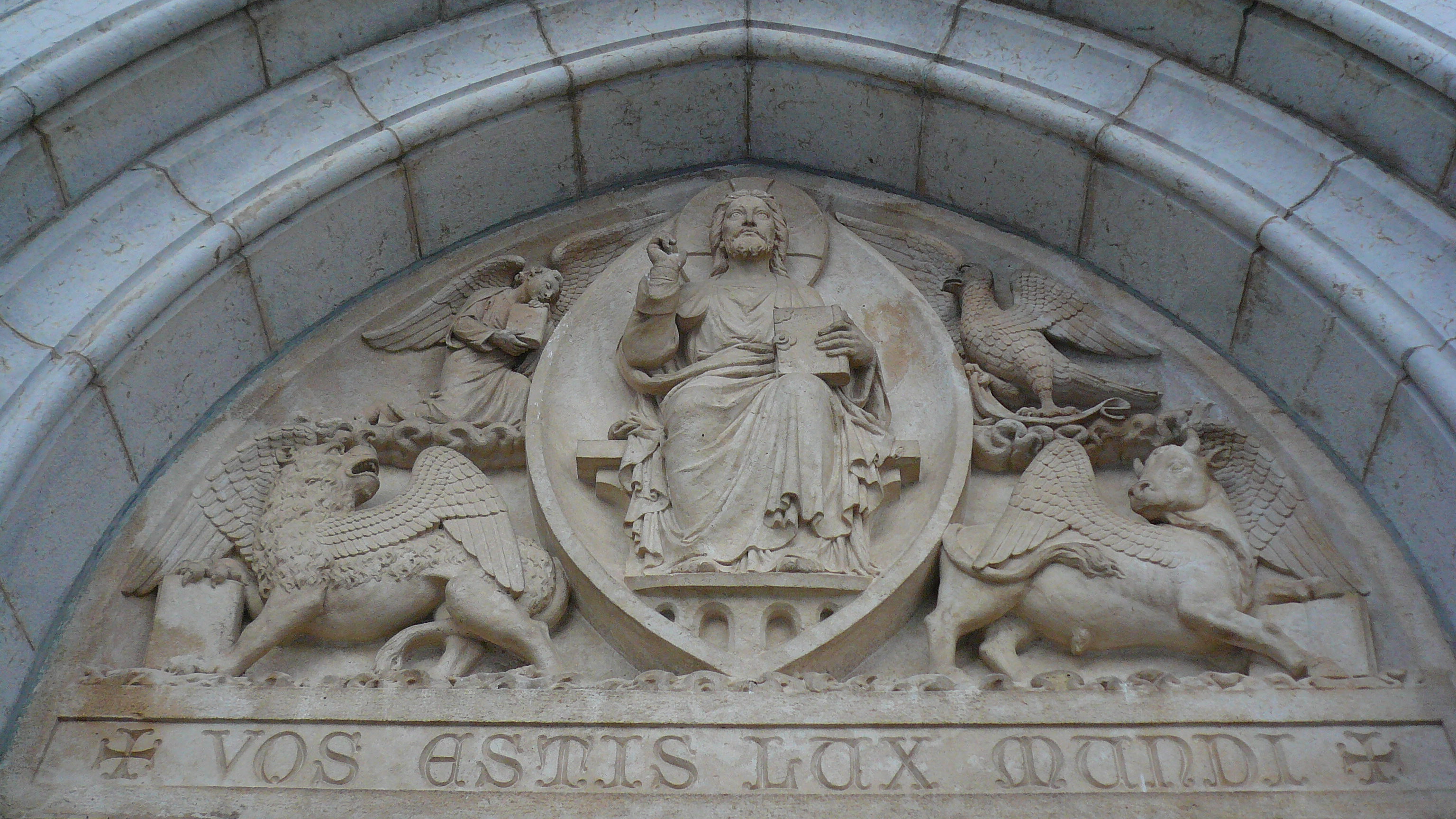 Montbenoît. L'Abbaye. La porte du monastère (détail). L'abbaye ne devient pas, comme l'abbaye de St-Claude, une principauté écclésiastique, elle reste sous la suzeraineté féodale des Sires de Joux. Chaque fois qu'un nouvel abbé est élu, le seigneur, Le Sire de Joux, se présente à la porte du monastère, entouré de ses vassaux et de ses hommes d'armes. L'abbé, crosse en main et mitre en tête, l'accueille et lui offre les clefs de la maison sur un plat d'argent. Pour bien marquer son autorité, le sire gouverne la communauté pendant toute la journée.